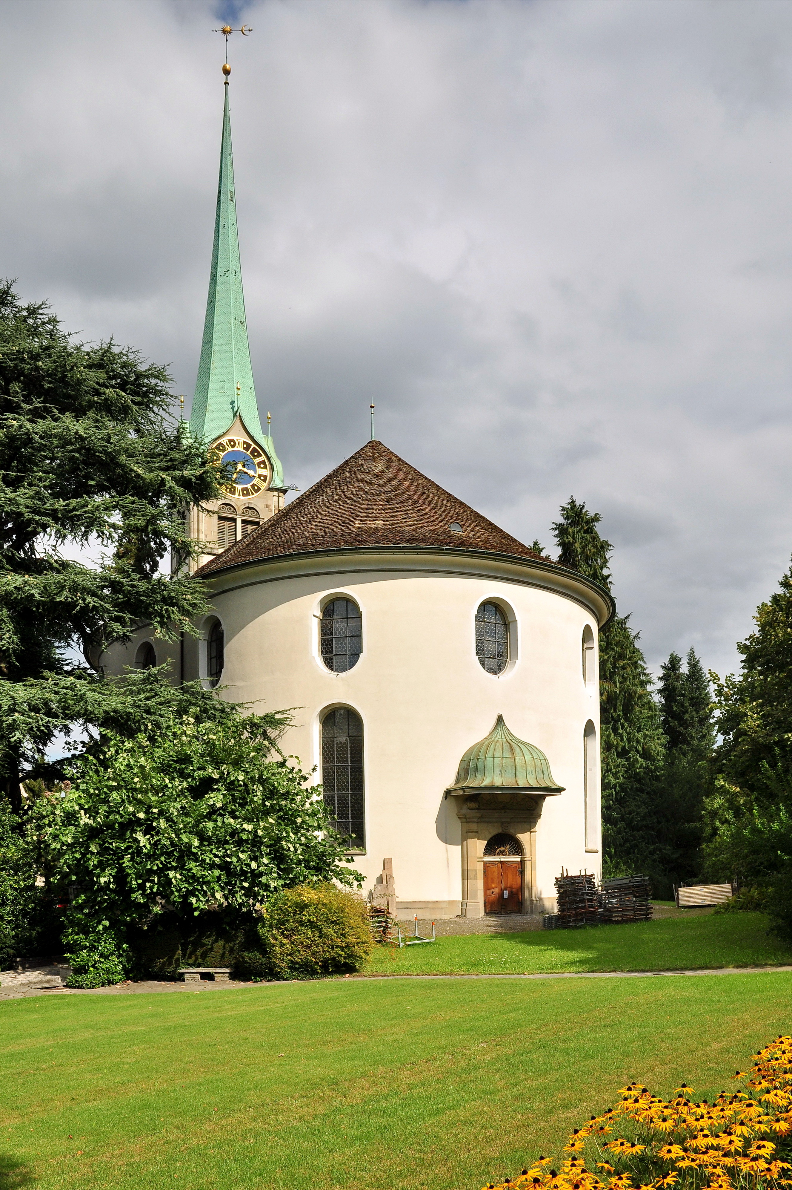 Reformierte Kirche, Kirchstrasse in Horgen (Switzerland)